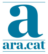 Logotip de l'Ara